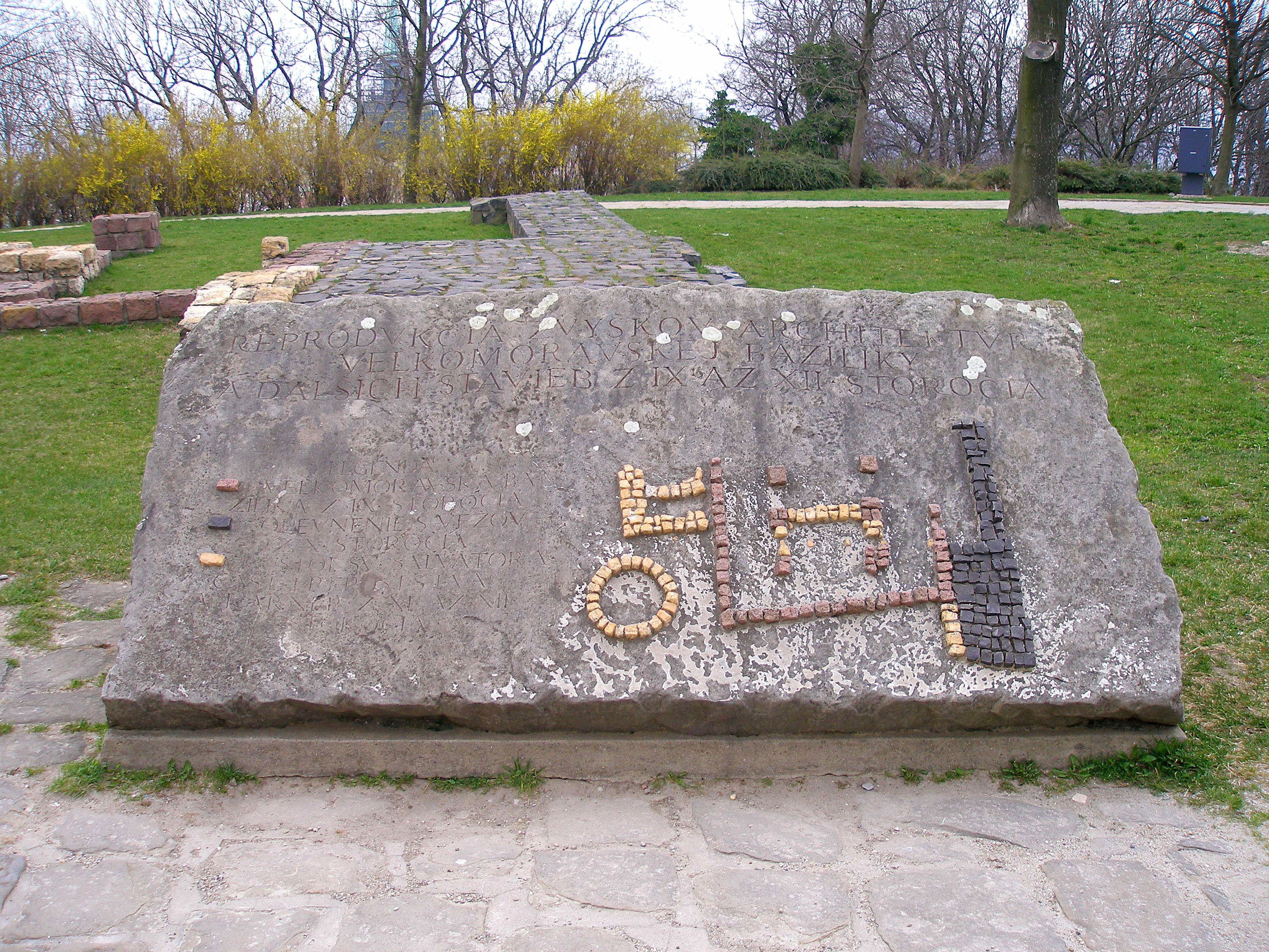 Informačný nápis s vysvetlivkami ozrejmujúcimi archeologické nálezy základov stavieb